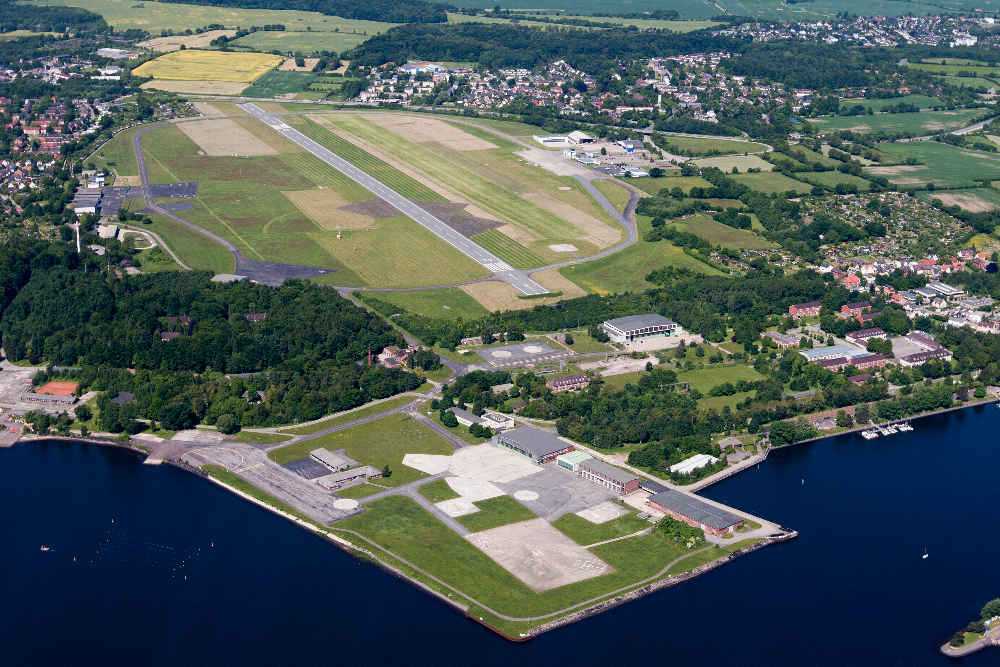 Luftaufnahme des Verkehrslandeplatzes Kiel-Holtenau (EDHK) und des Heliport Kiel-Holtenau (ETMK)